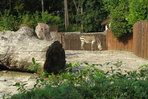 ZOO Bojnice - Expozícia pre zebry Hartmmanovej